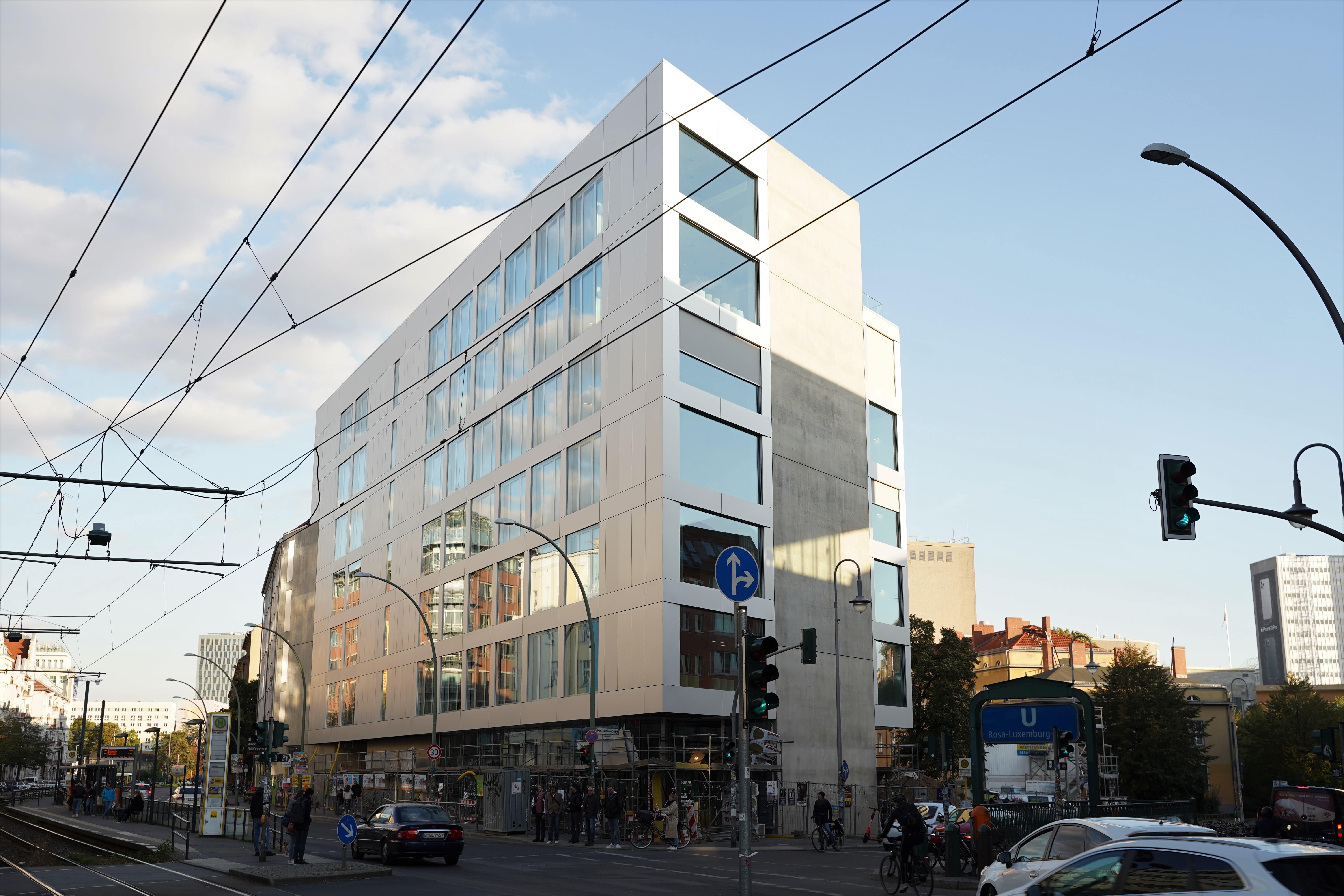 Suhrkamp Verlag Linienstraße 34 10178 Berlin